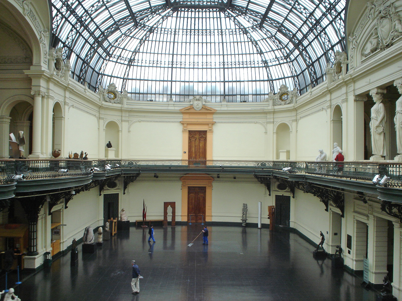 Hall principal del Museo Nacional de Bellas Artes en Santiago de Chile